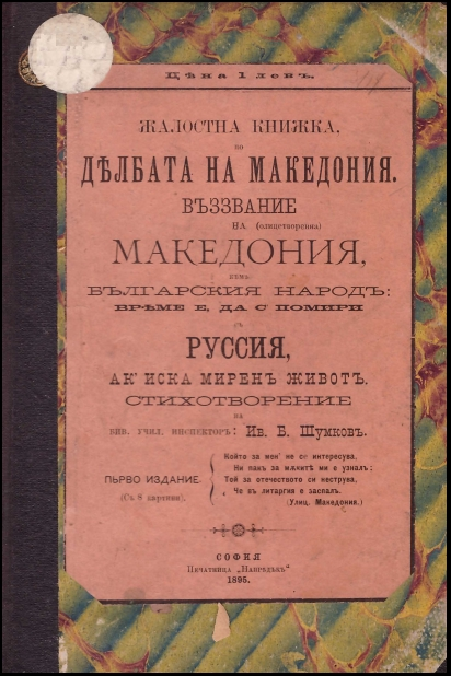 Корица на "Жалостна книжка"